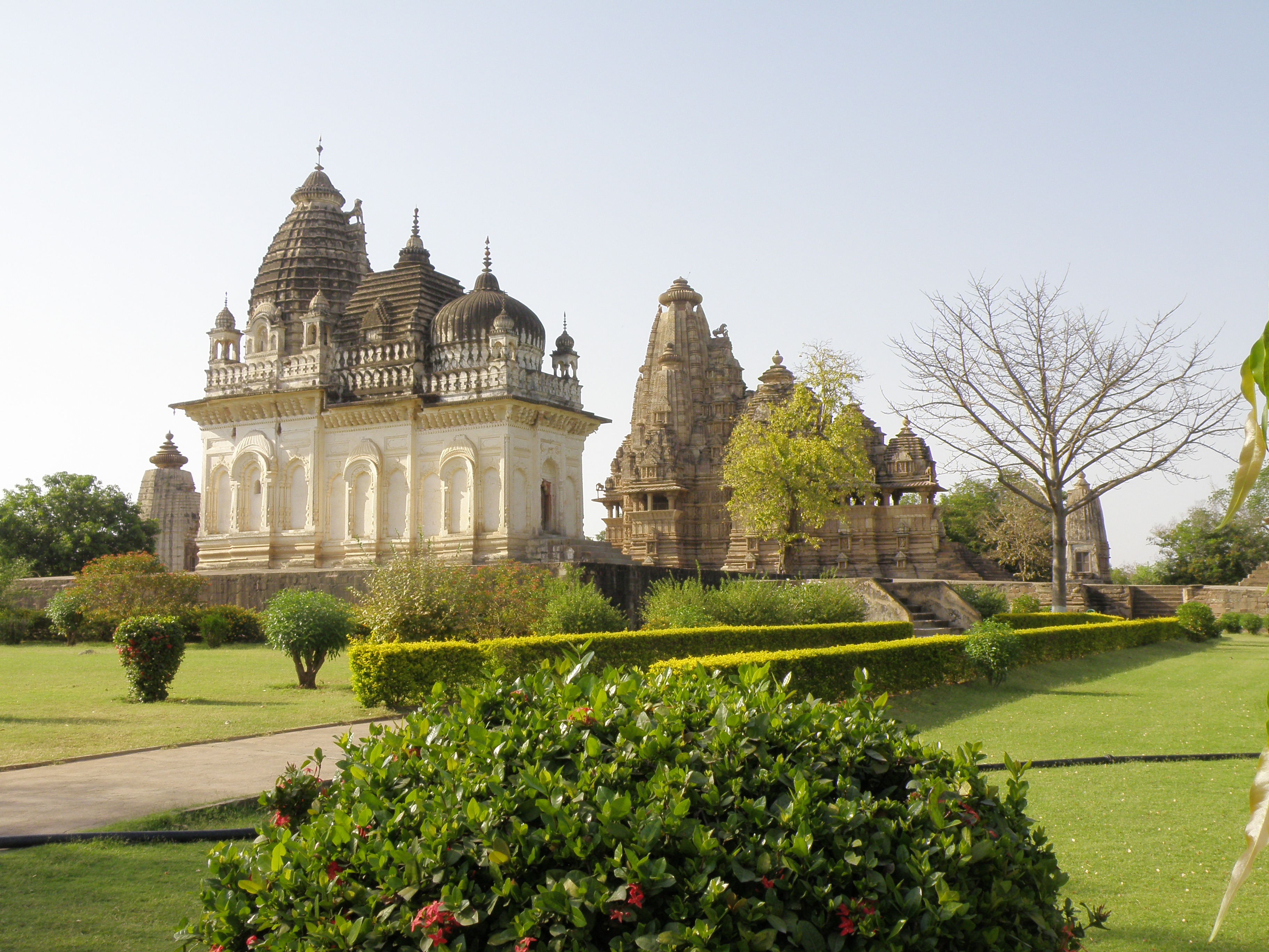 Les temples Pratapesvara et Viswanath à Khajurahô - Inde